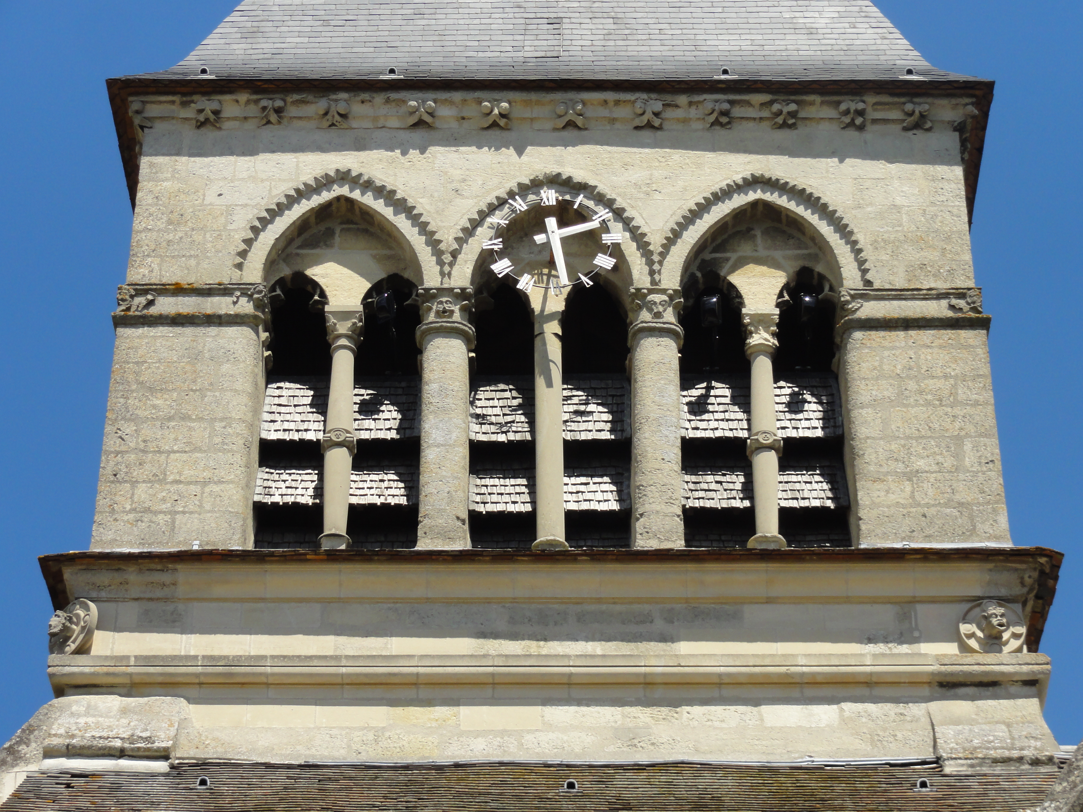 Église Saint-Étienne de Clairoix (voir titre).